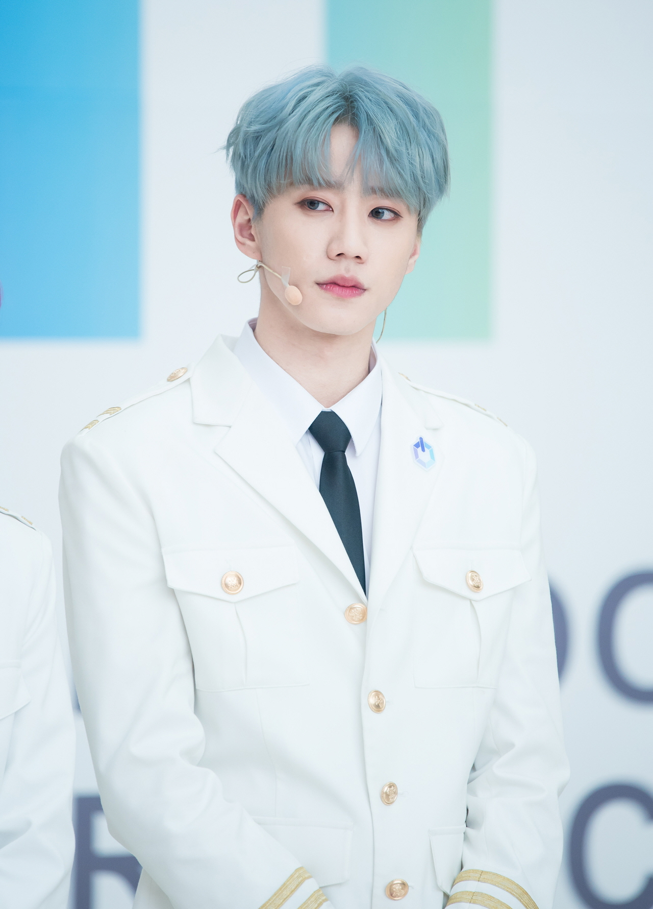 180211 더유닛 유닛B